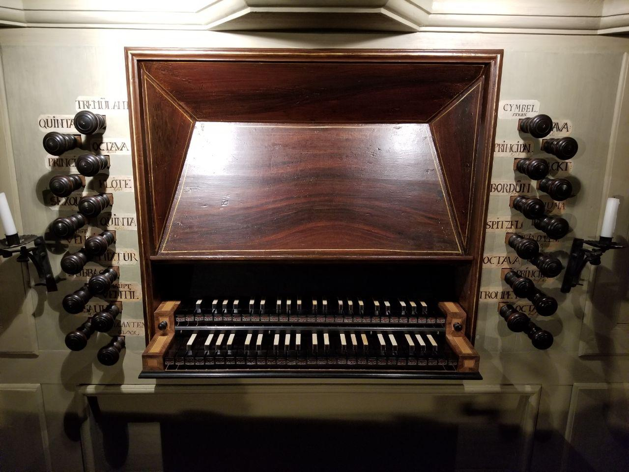 Feldsteinkirche Trebel. Der Organistenplatz